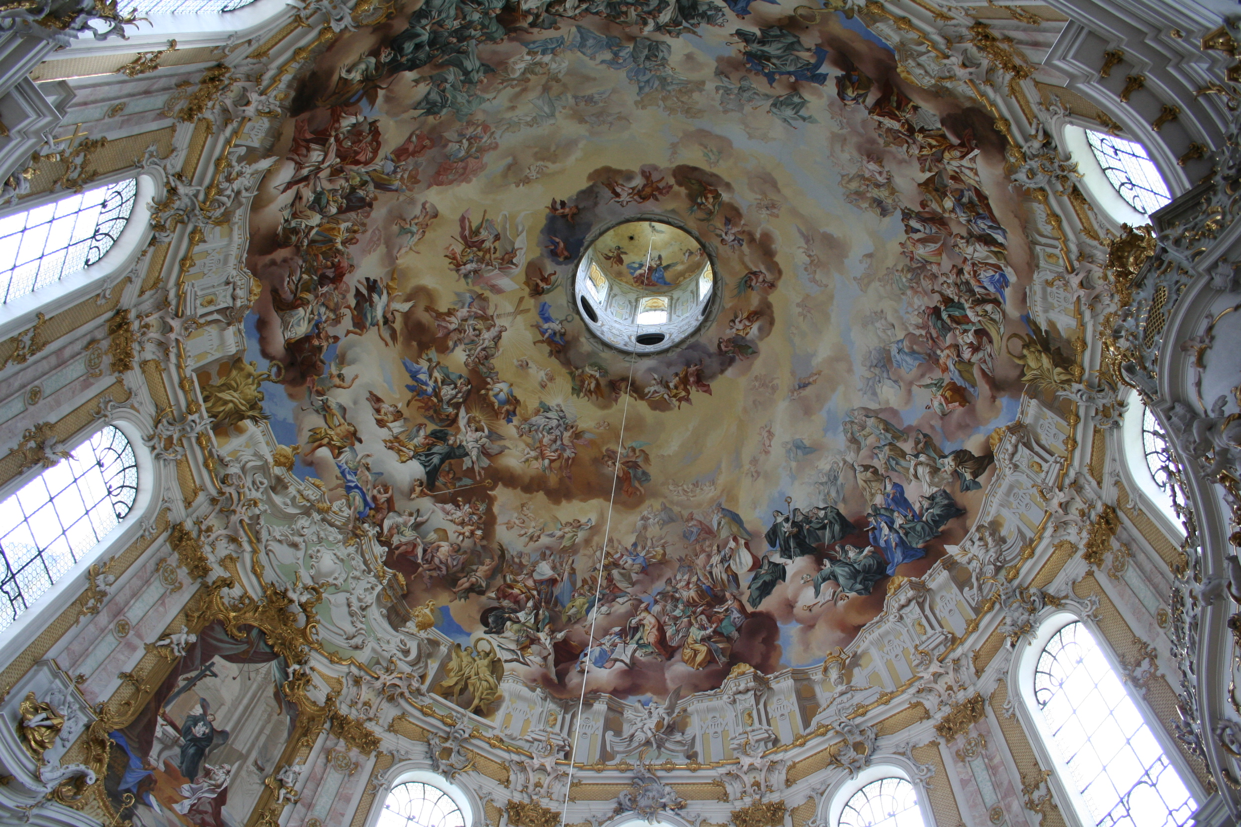 Kuppelfresko von Johann Jakob Zeiller in der Klosterkirche von Ettal